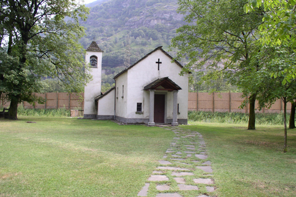 Oratorio della Madonna di Re a Pollegio